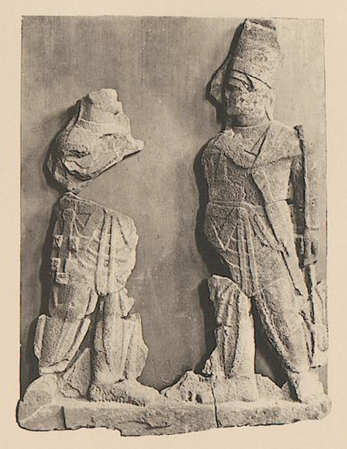 Investiturrelief auf der Westterrasse am Nemrut Dağı, Türkei